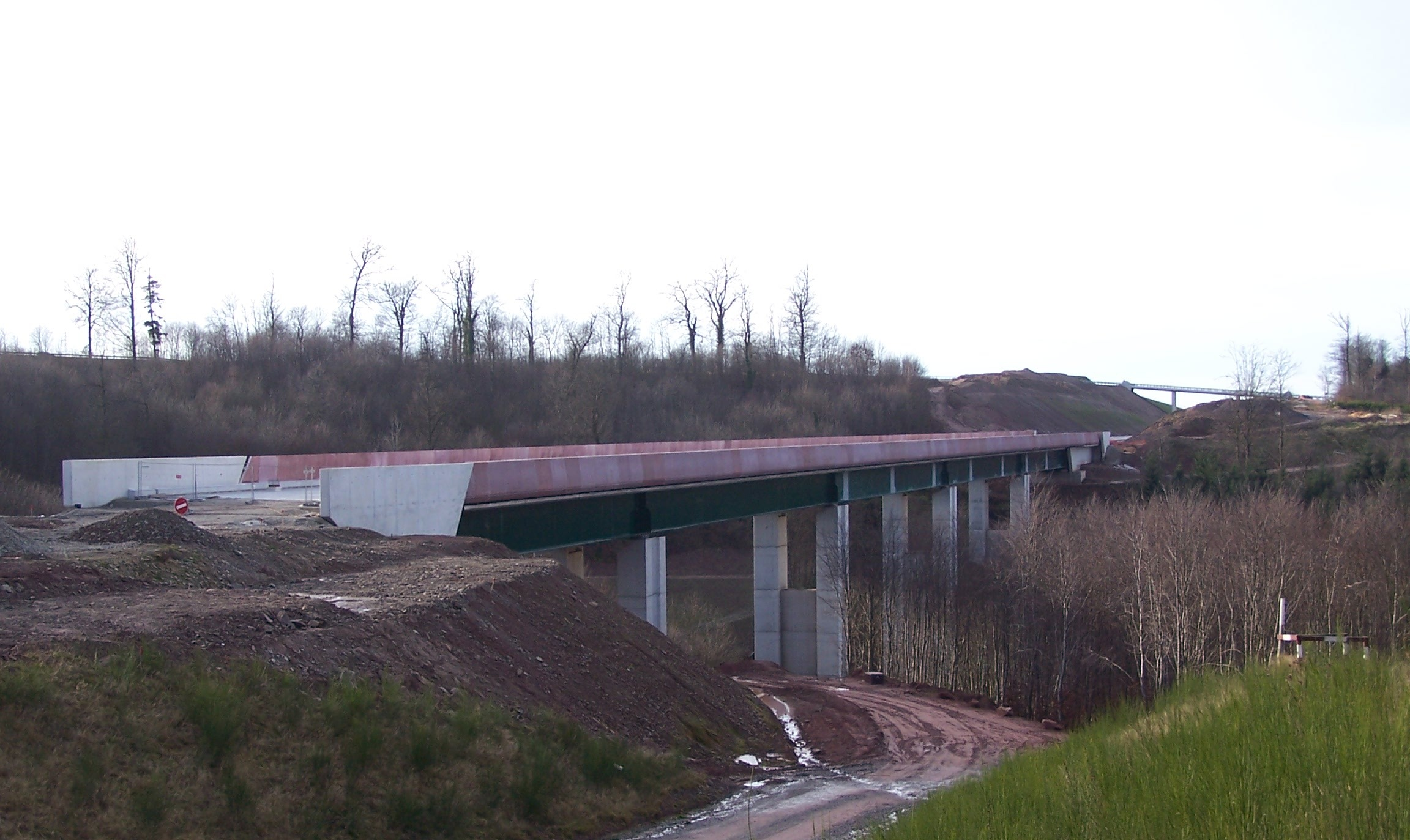 Blick auf das viaduc de Haspelbaechel